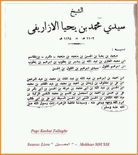 Al Maâssoul